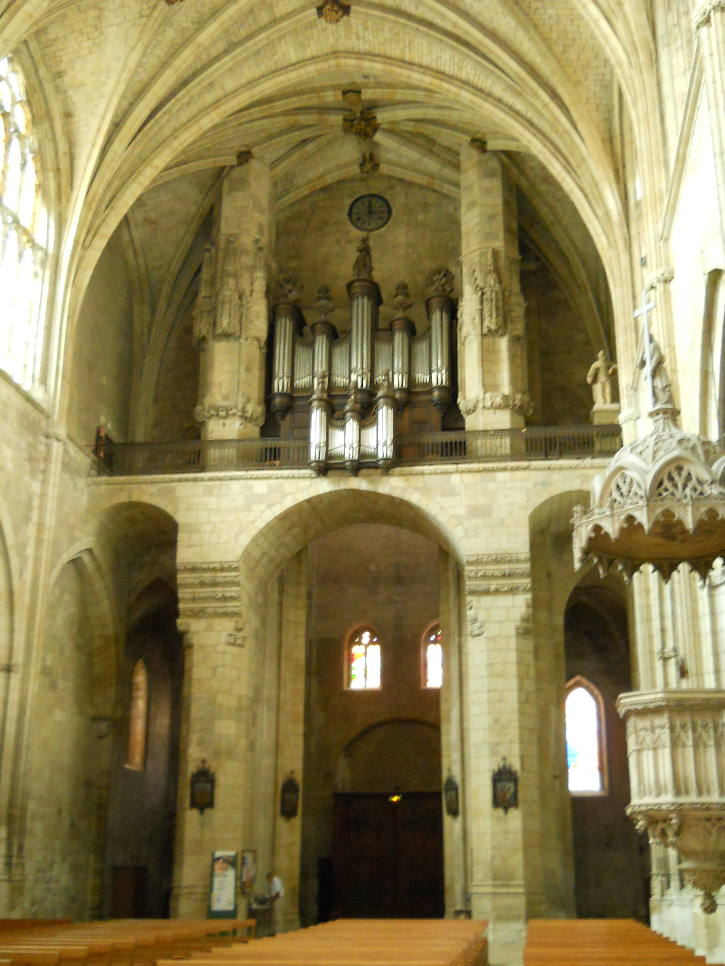 Cathédrale de Condom (Gers, France) et son orgue commencé en 1837 par Auguste Phébade et achevé par Wenner & Götty en 1853, restauré en 1979 par Robert Chauvin.